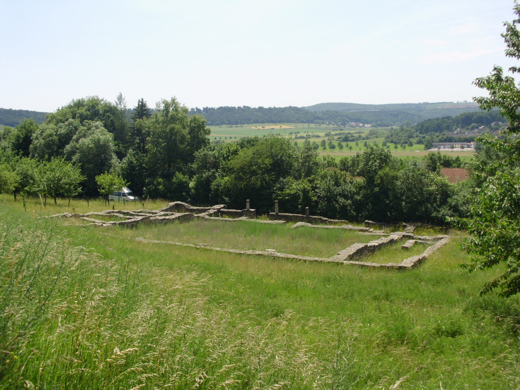 Treuchtlingen, Villa rustica am Nagelberg